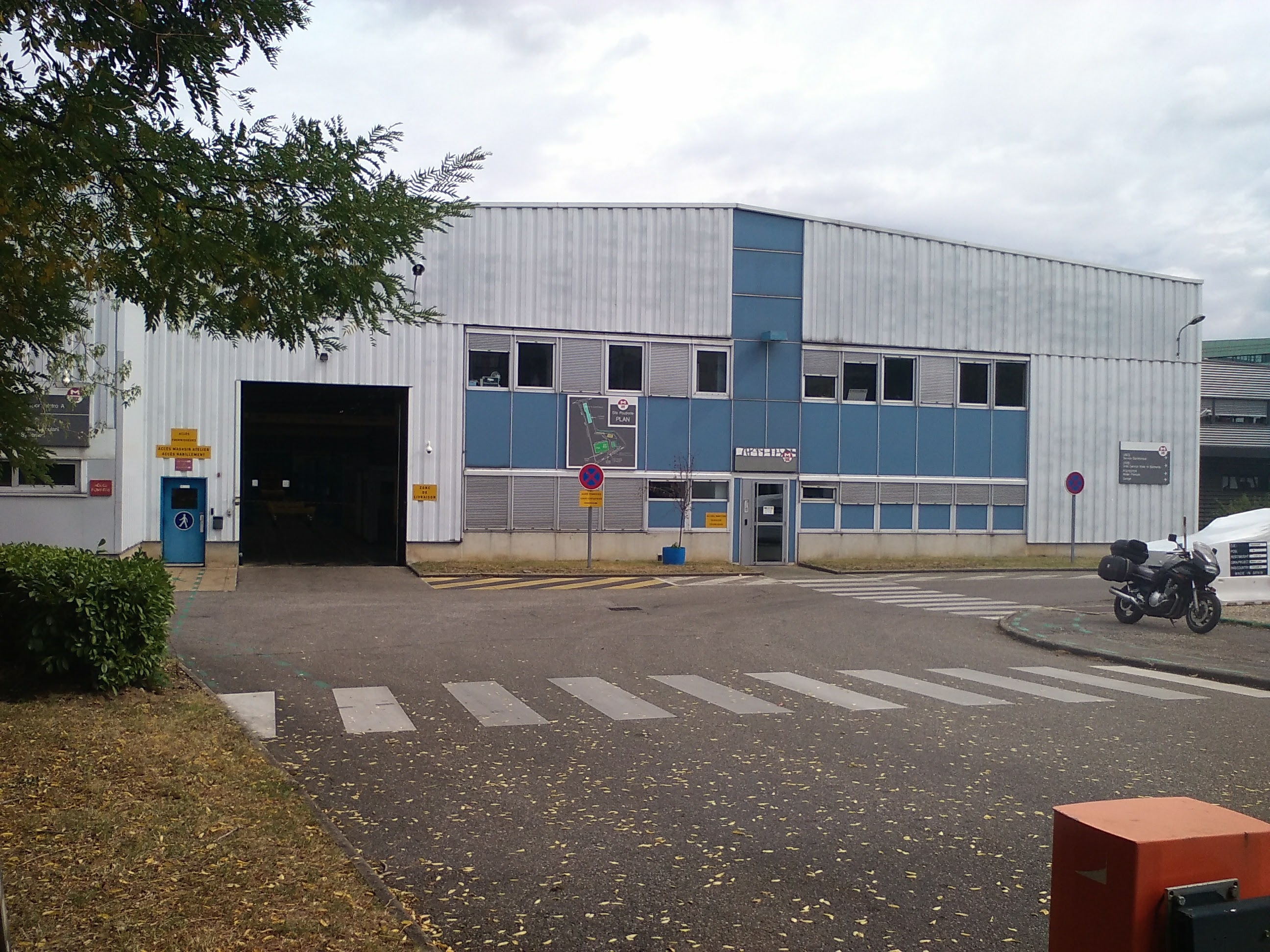 Entrée unité de transport métro de la Poudrette Vaulx-enVelin